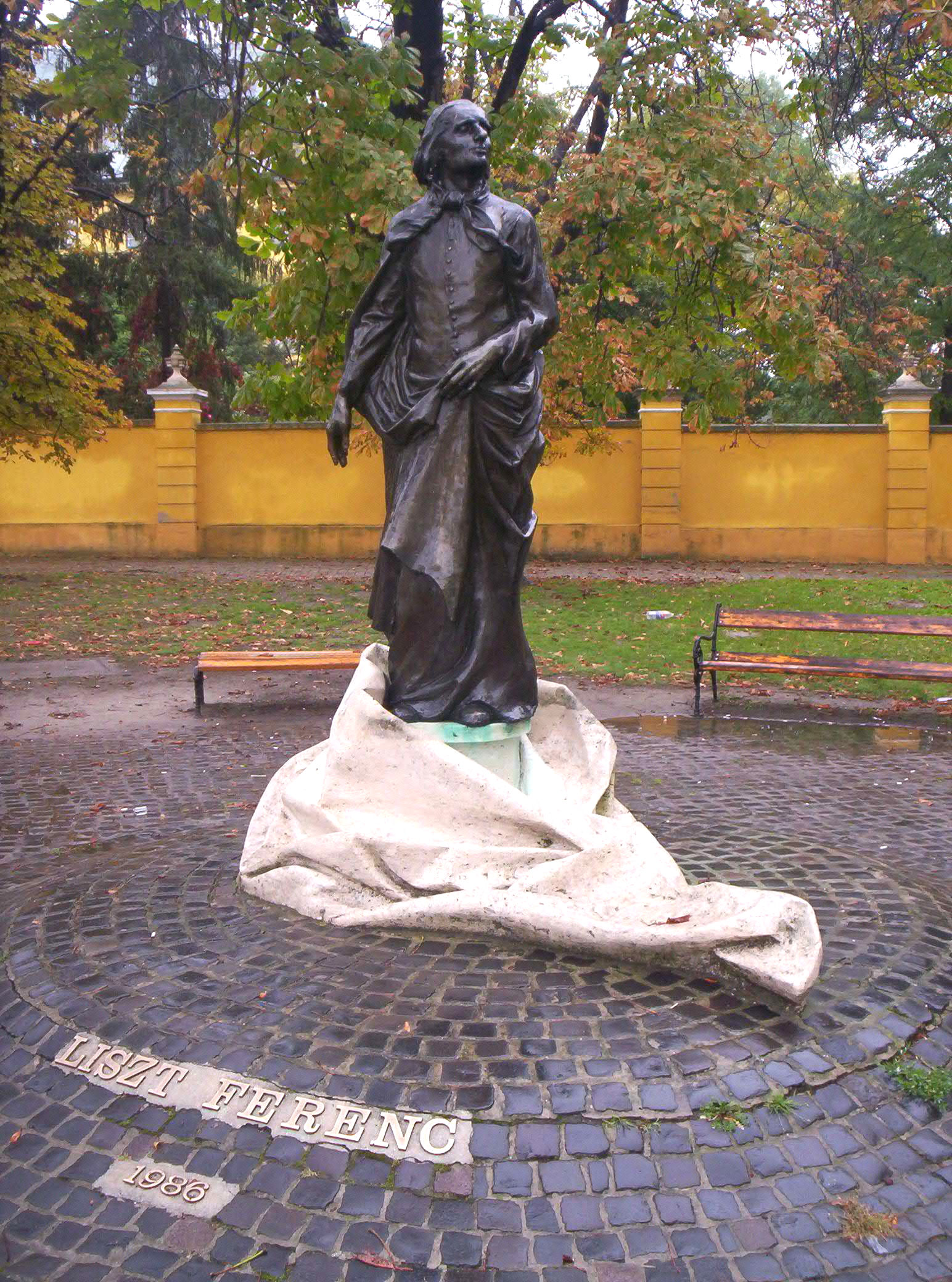 Liszt Ferenc szobra Kalocsán. (Eskulits Tamás alkotása) – photo taken by the uploader 2005